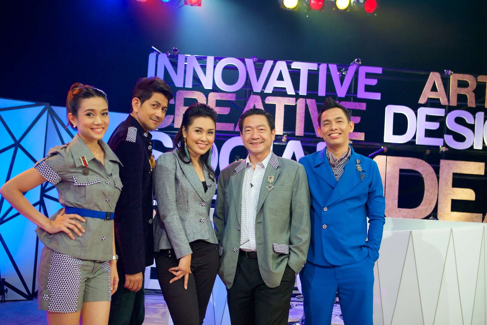 พิธีกรรายการสมรภูมิไอเดย